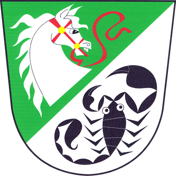 Znak obce Nehodiv.